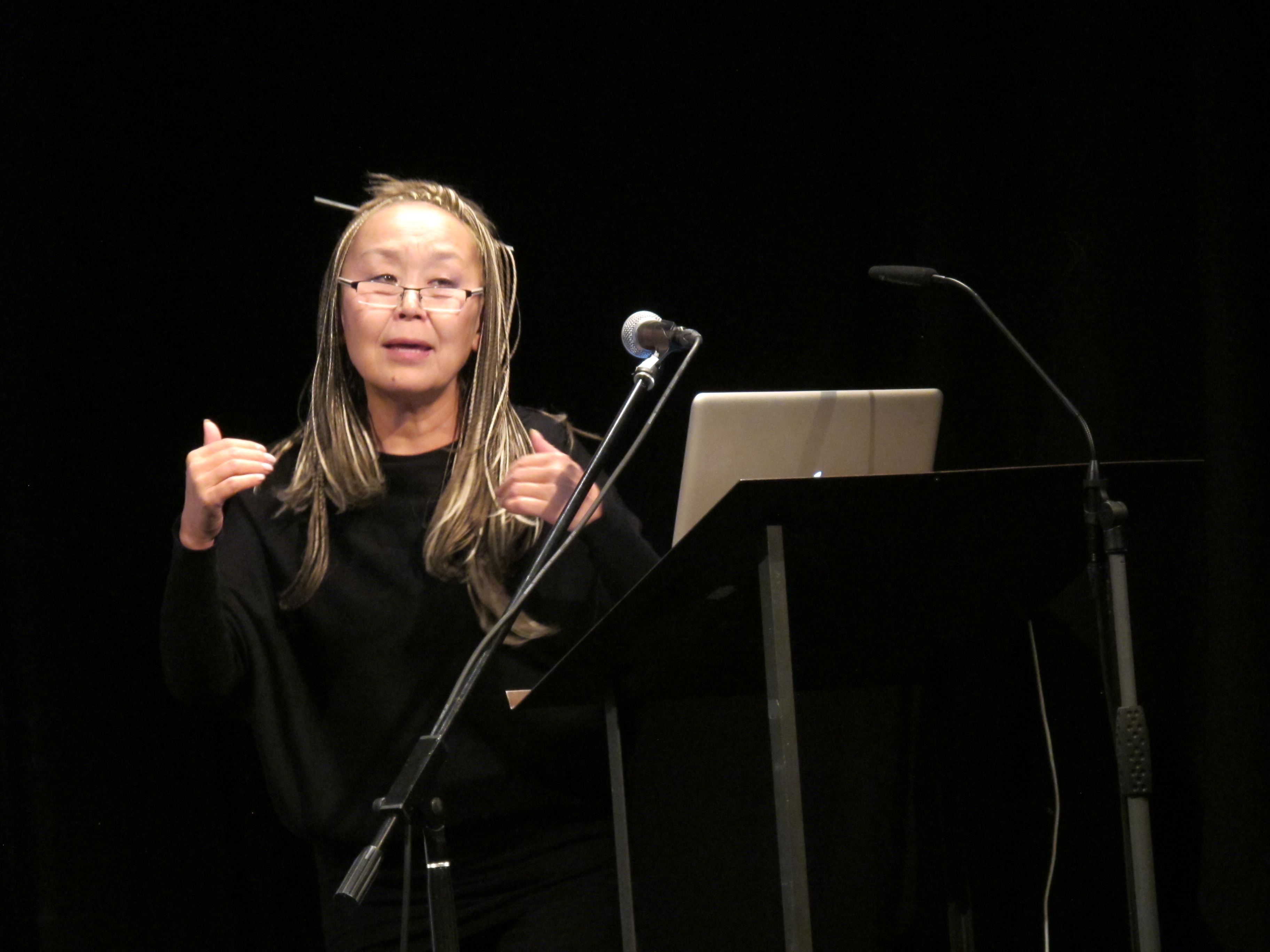 Schamrock Festival 2014 Sainkho Namchylak